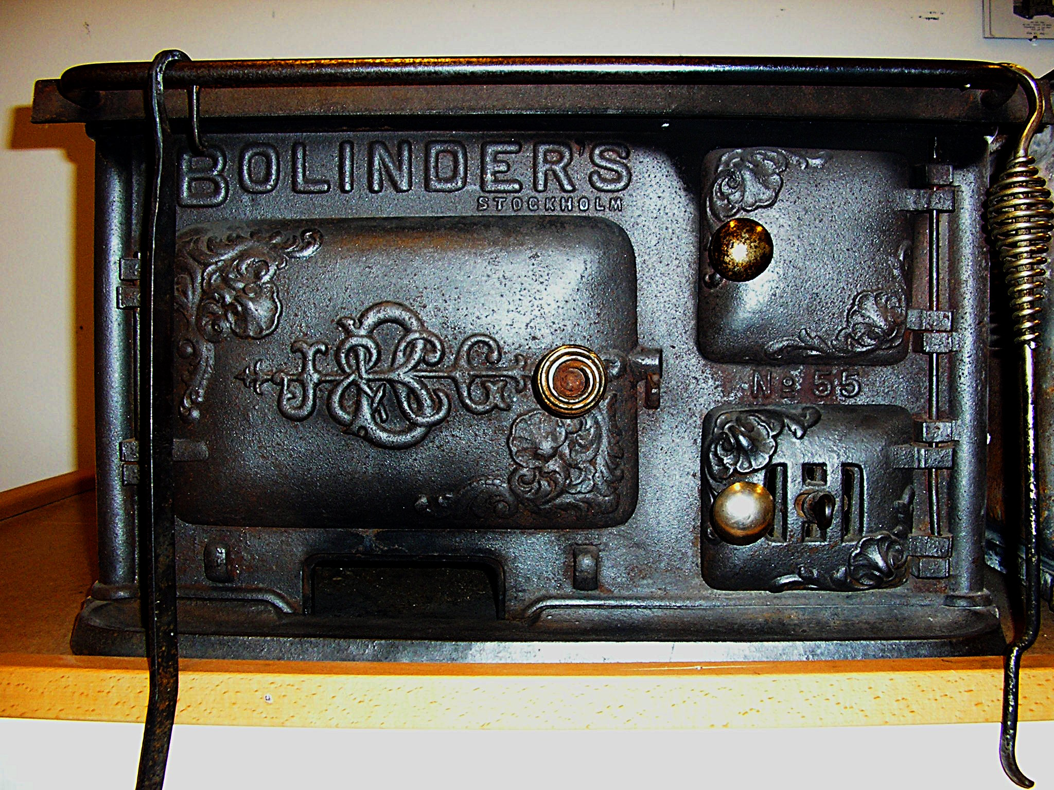 Bolinder's wood stove